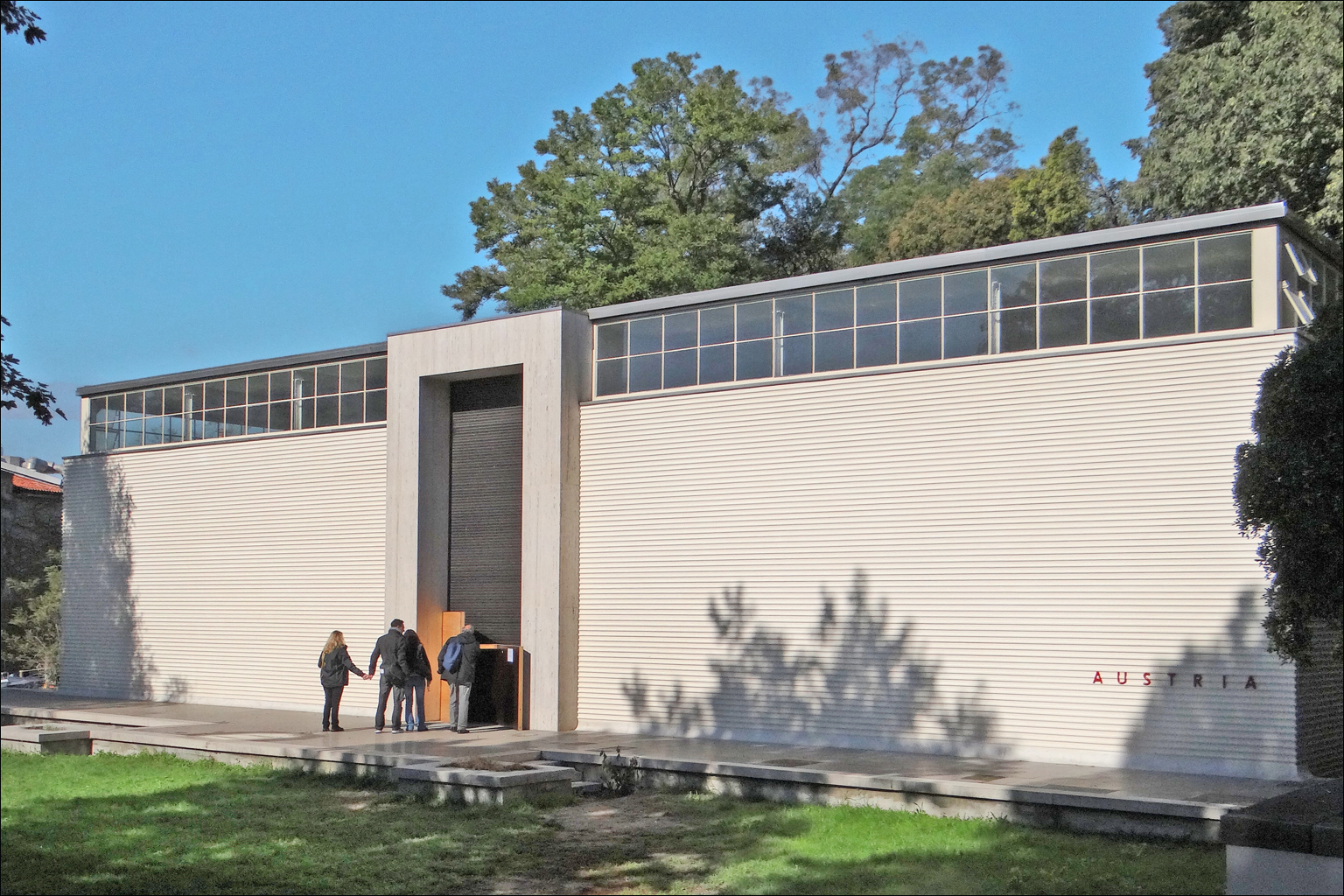 Façade du pavillon de l'Autriche dans la partie des "Giardini" de la Biennale se trouvant sur l'île Sant'Elena Exposition "hands have no tears to flow..". Wolfgang Tschapeller Commissario: Arno Ritter. Cette exposition entièrement visuelle et numérique entend interroger les relations entre les représentations du corps et de l'architecture. Très complexe d'un point de vue technique mais en panne certains jours, elle a transformé l'espace intérieur du pavillon en faisant flotter des personnages sur les murs et en jouant sur les reflets générés par de grands écrans réfléchissants. Site du pavillon de l'Autriche ________________ Le pavillon de l'Autriche a été conçu par le célèbre designer autrichien Josef Hoffmann, l'un des fondateurs de la Sécession viennoise et de la Wiener Werkstätte, il a été ouvert en 1934. Le bâtiment est composé de deux parties symétriques avec une entrée commune qui se prolonge sur toute sa hauteur. A l'arrière se trouve un vaste patio.